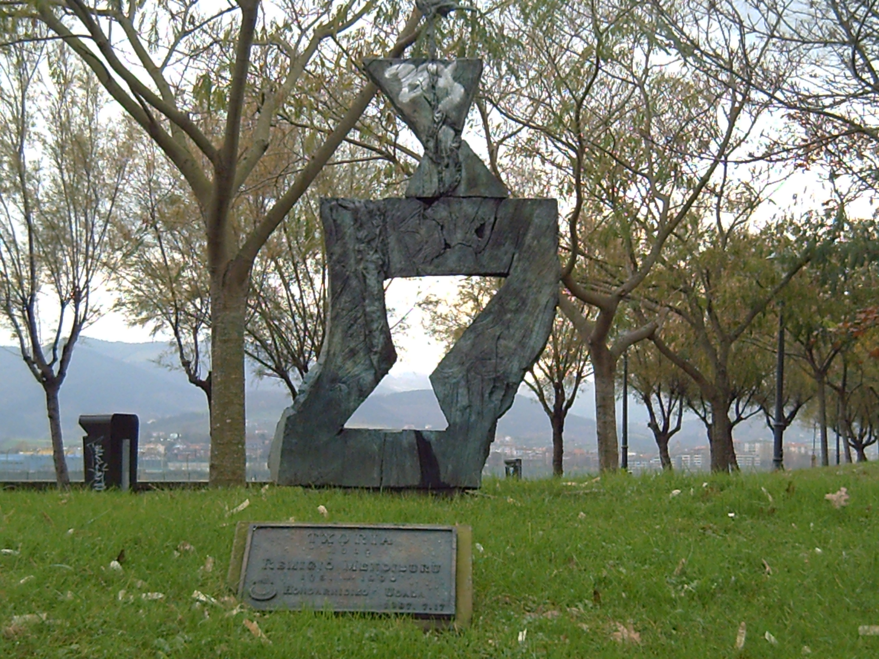 Remigio Mendibururen txoria eskultura, Hondarribiko Puntalean